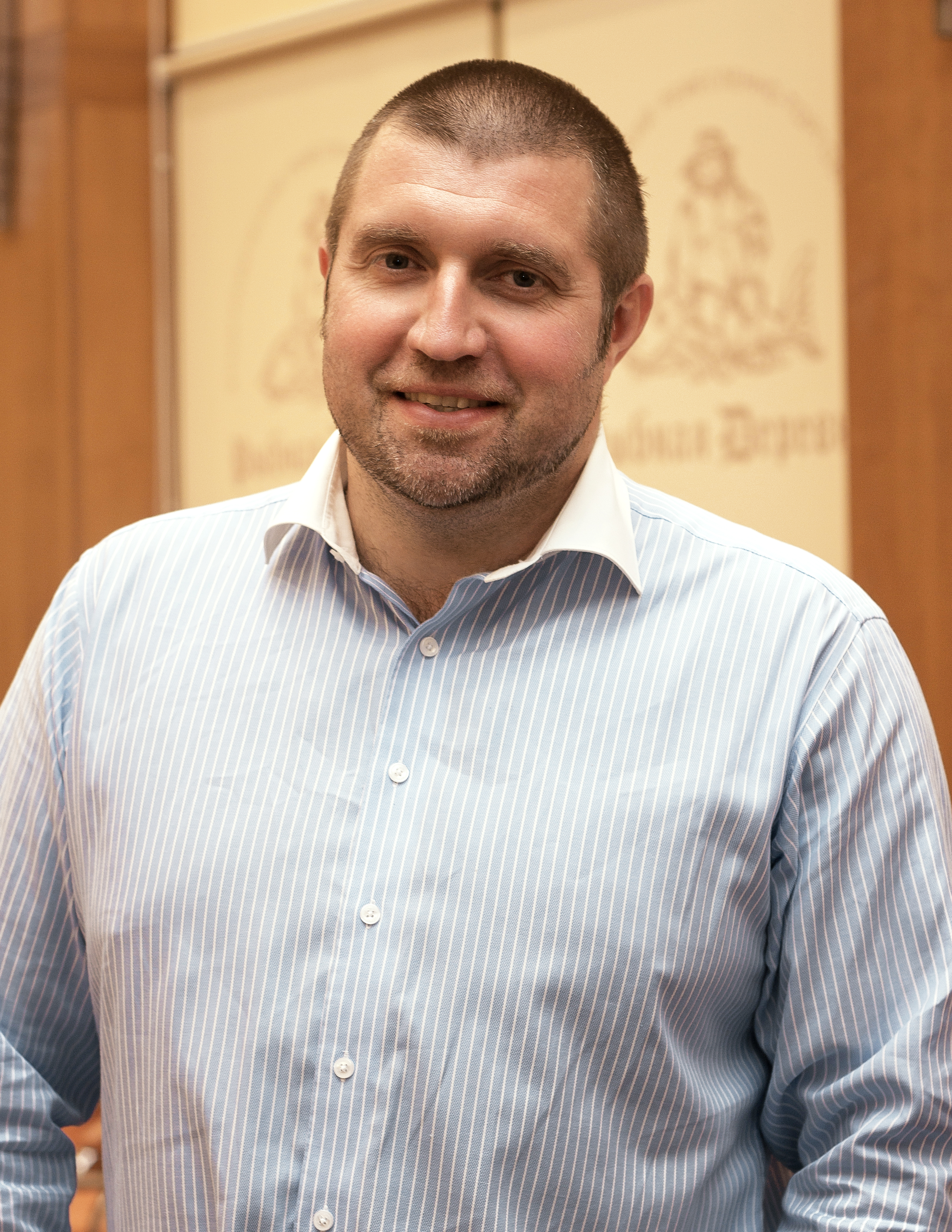 Илья Потапенко